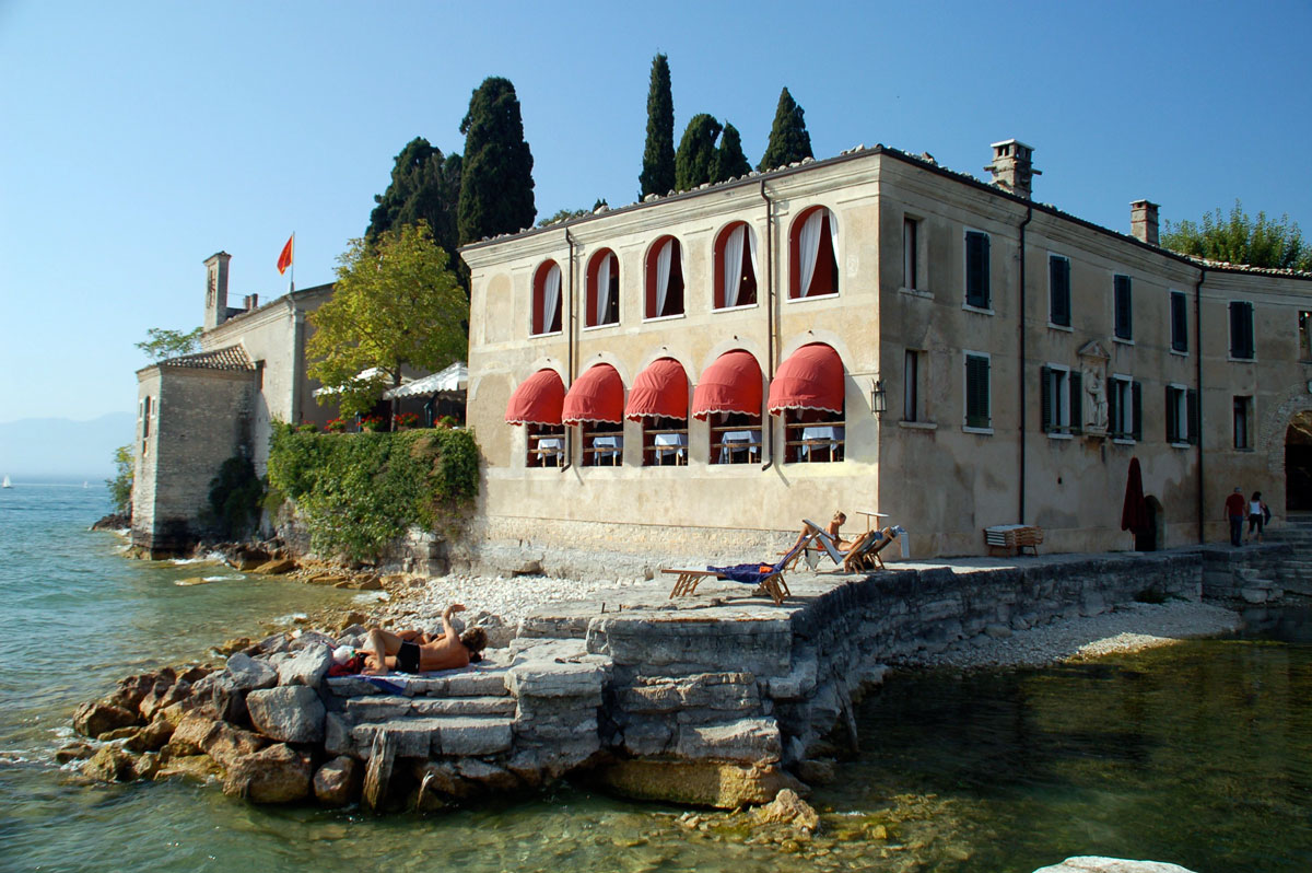 Punta San Vigilio, Gardasee, Italien (Lake Garda, Italy)